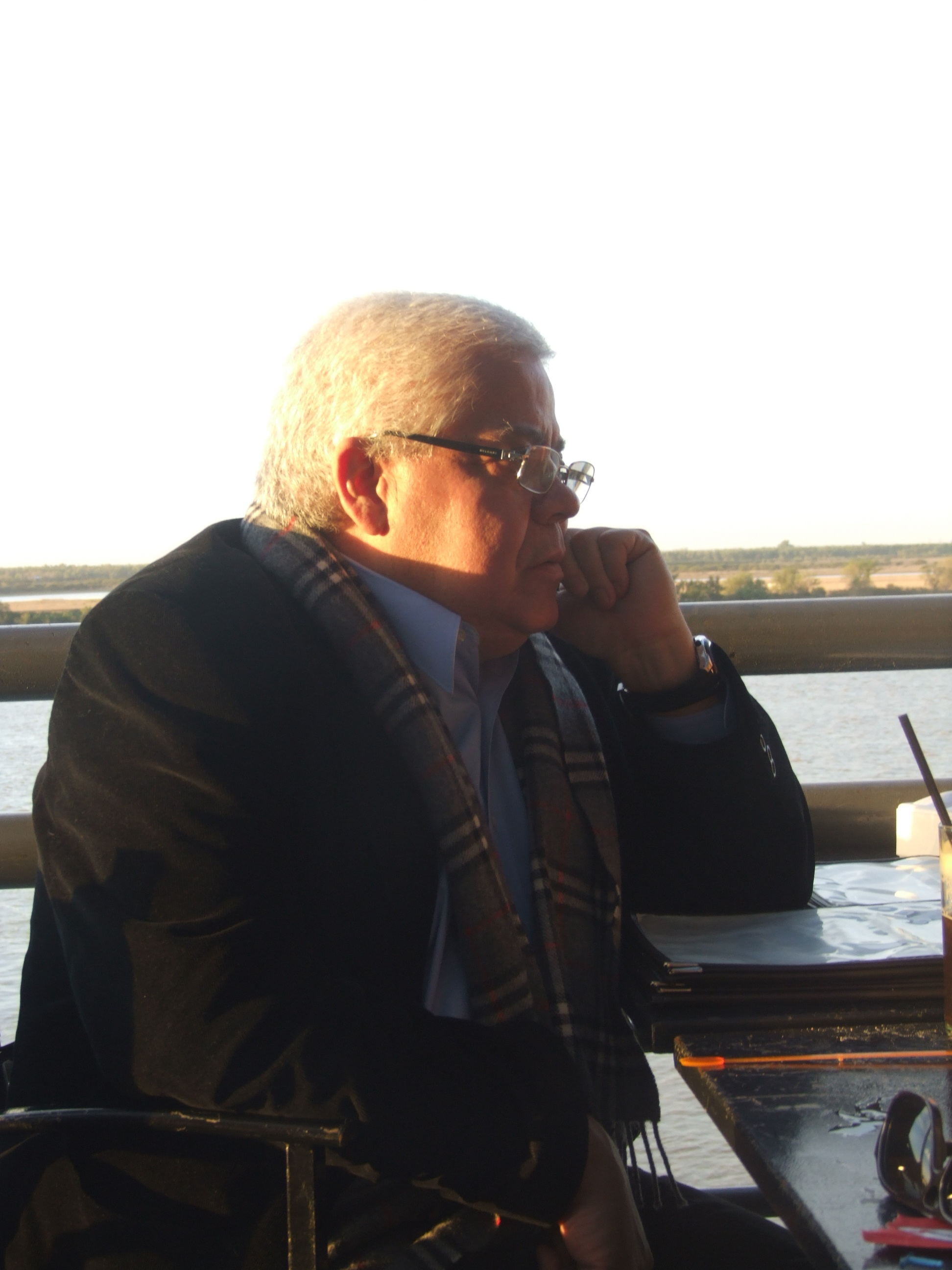 Enrique Márquez Jaramillo